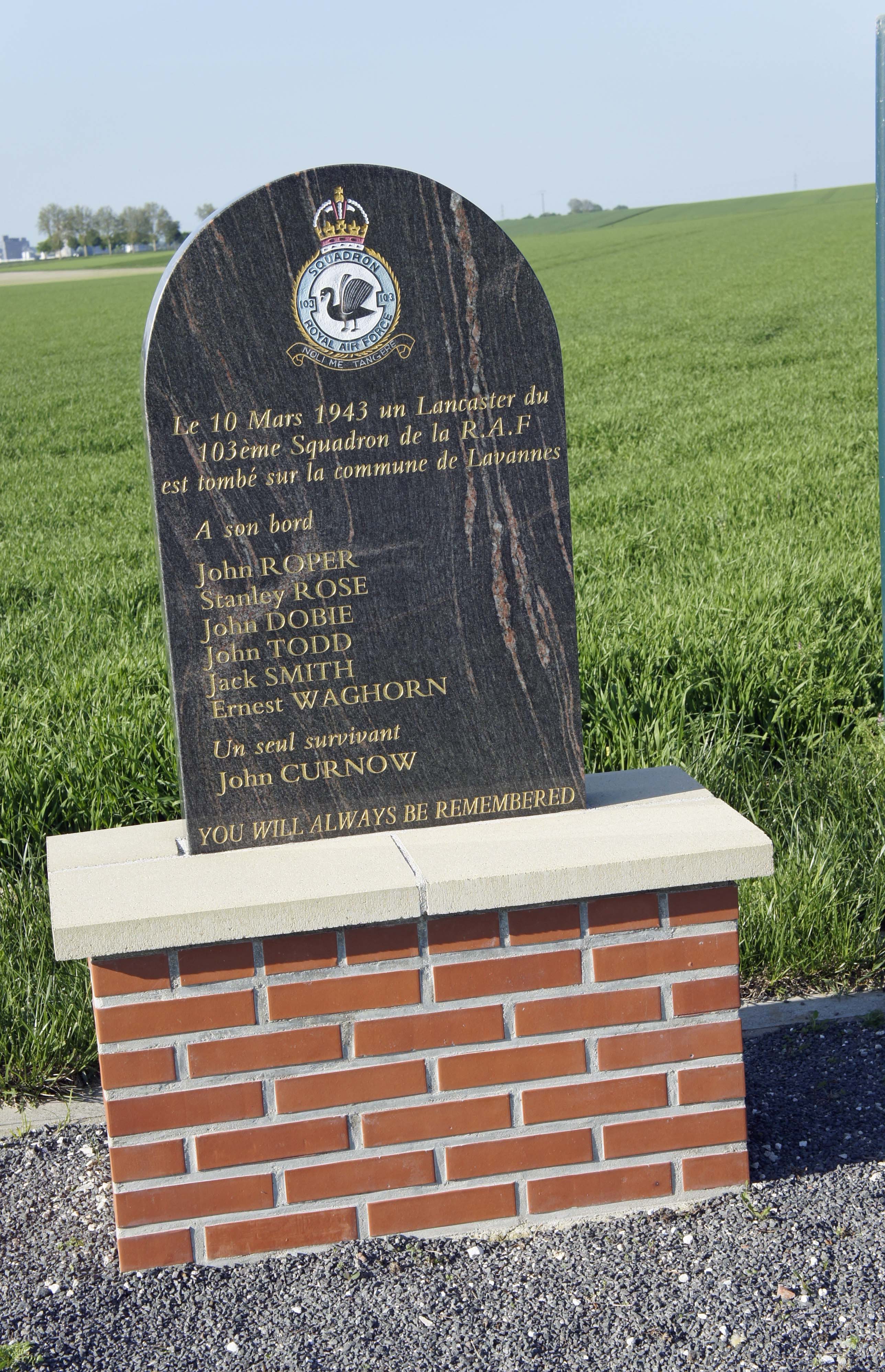 monument en hommage au 103e squadron de la R.A.F qui a perdu là un avion le 10 mars 1943.